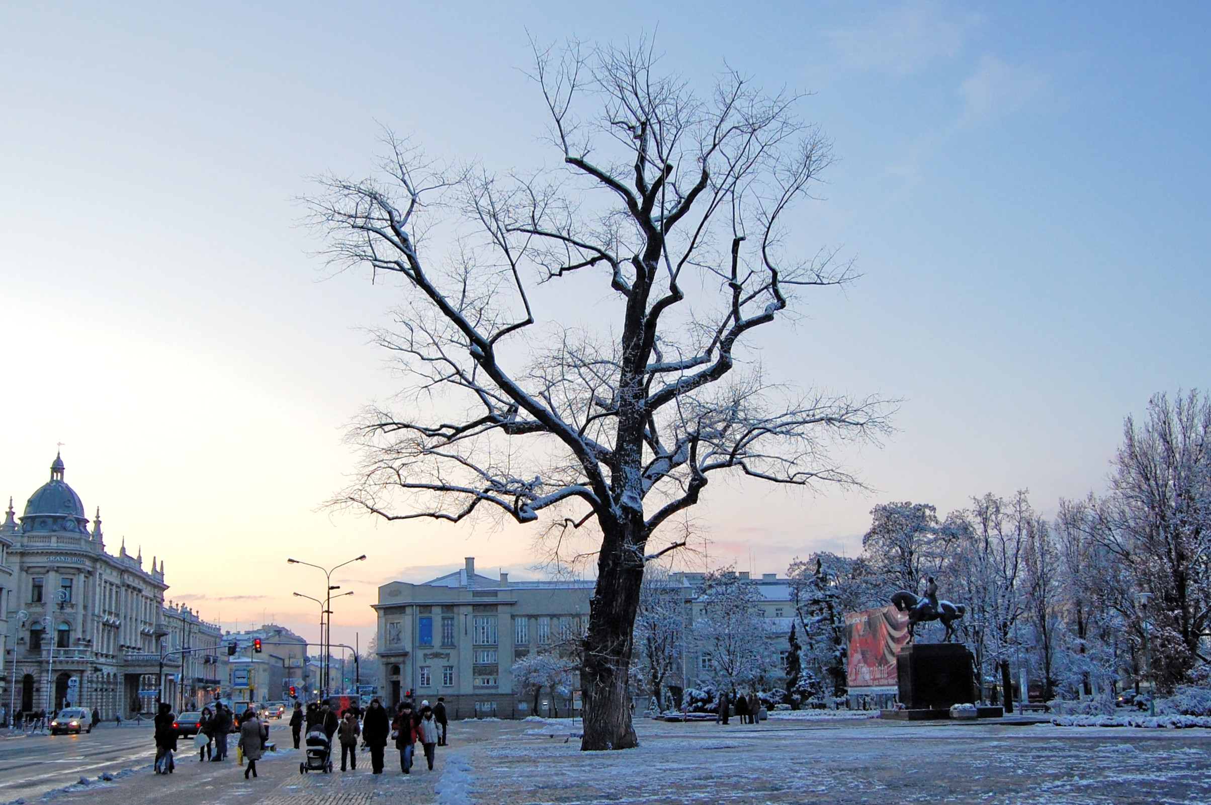 Plac Litewski w Lublinie, baobab